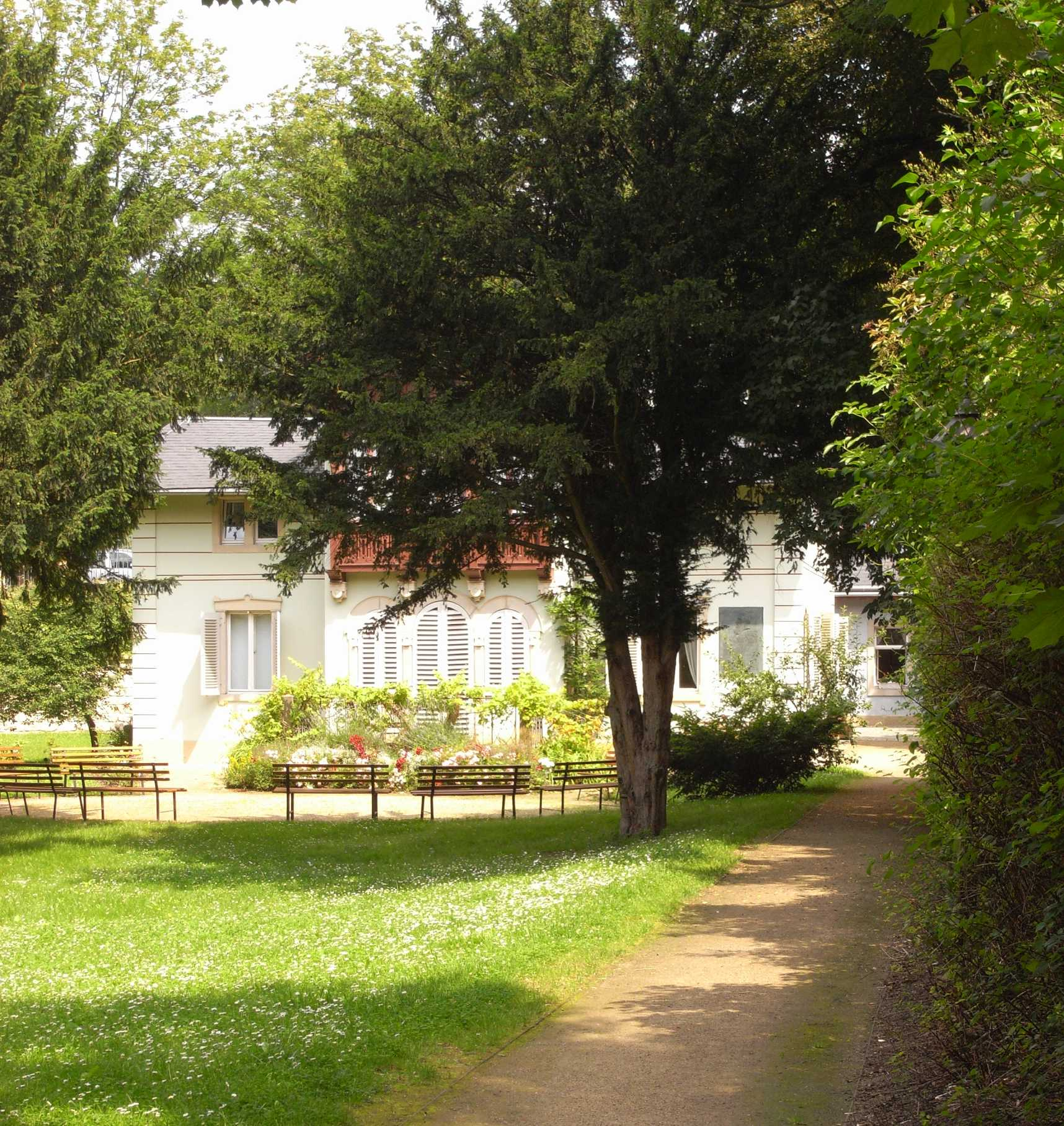 Беларуская (тарашкевіца): Музэй Крашэўскага ў Дрэздэне